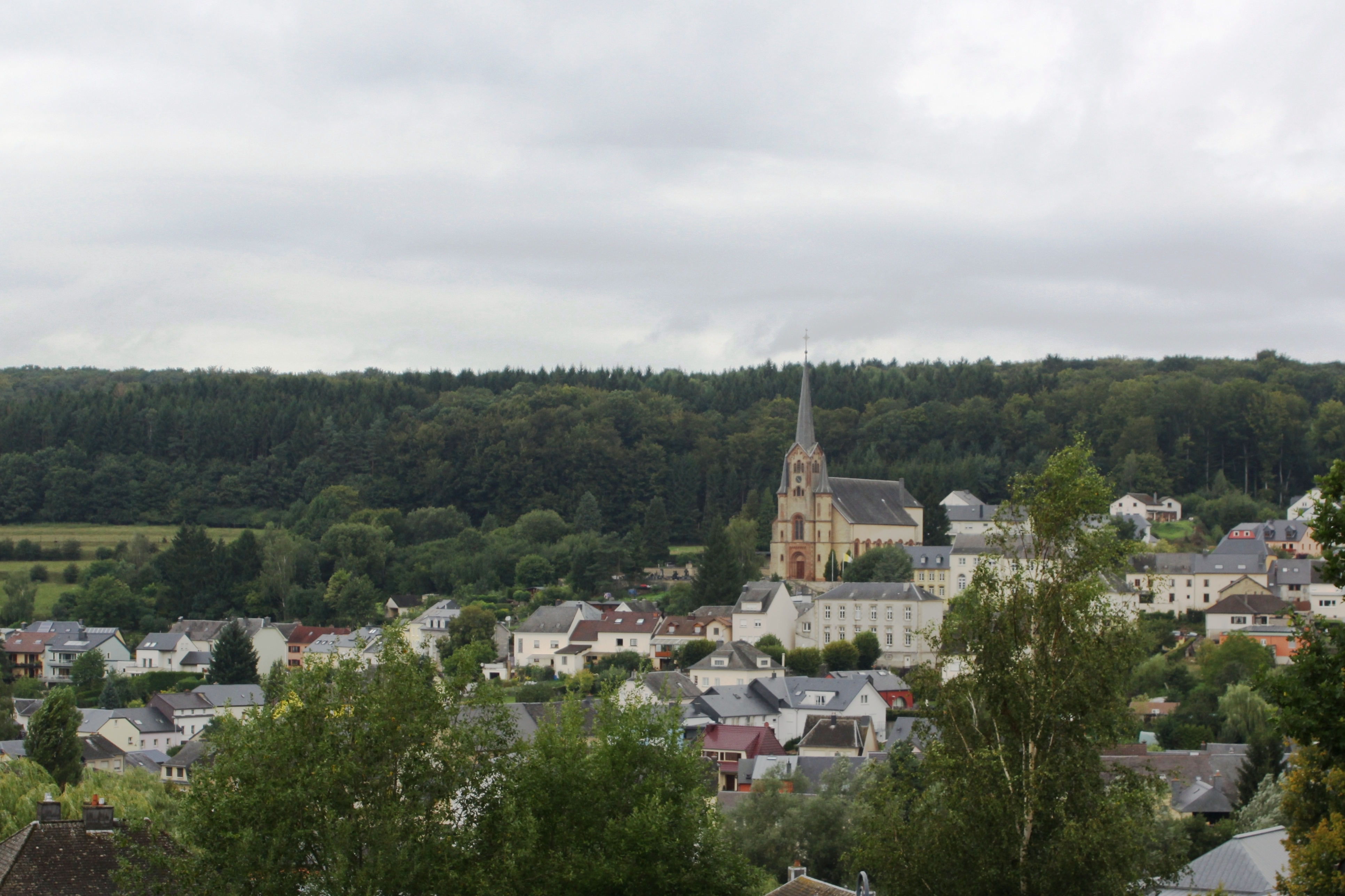 Le village luxembourgeois d'Eischen